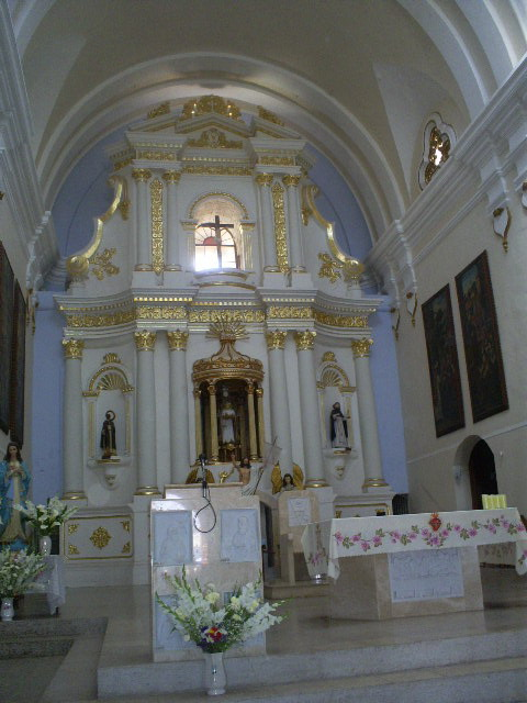 Co-Catedral por dentro, de Moquegua